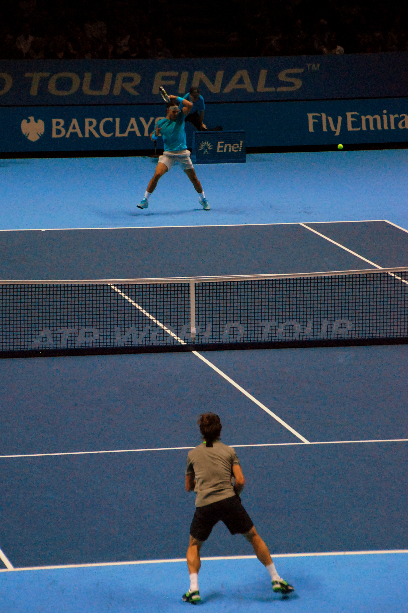 Nadal v Ferrer